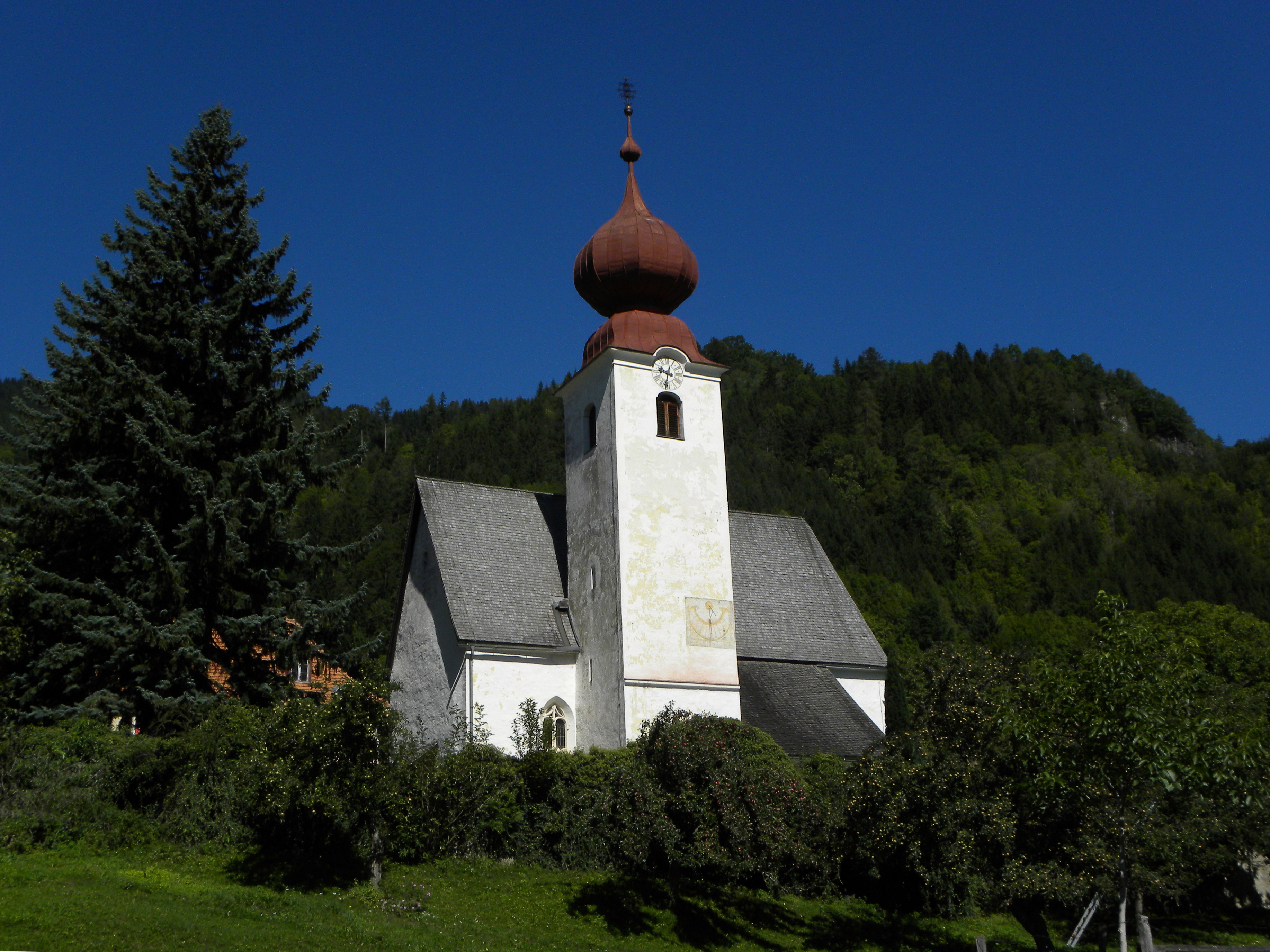 Kath. Pfarrkirche St. Johann und Friedhof